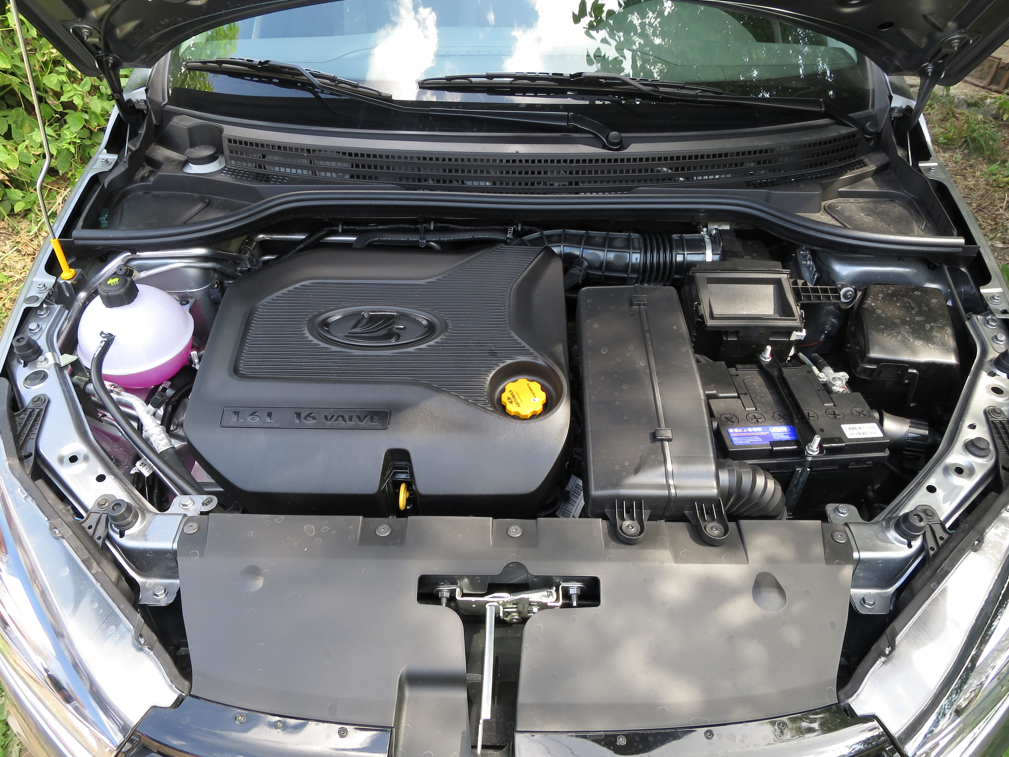 Подкапотное пространство Lada Vesta